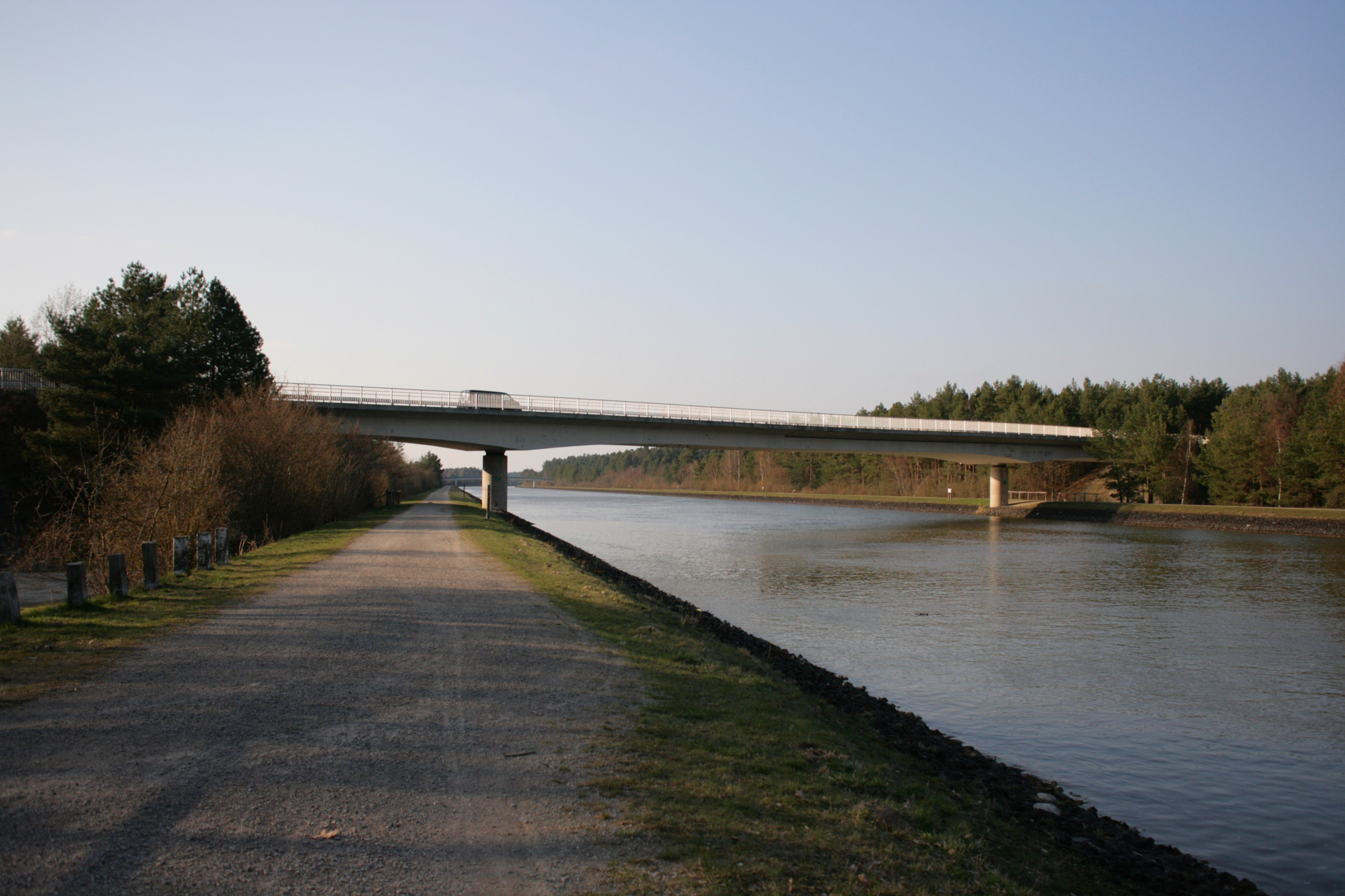 Brücke der Dahlenburger Straße über den Elbe-Seitenkanal in Bad Bevensen